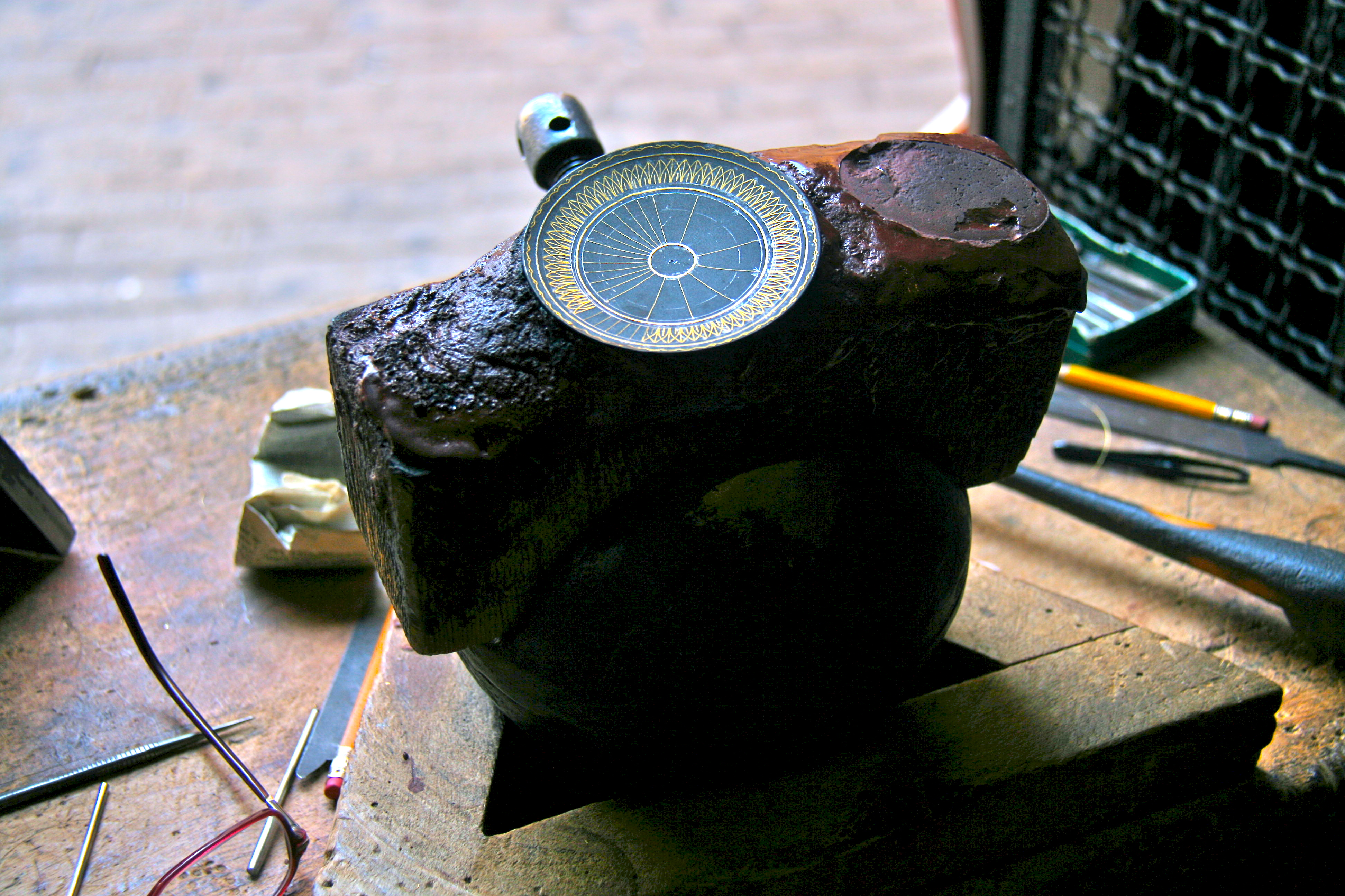 Bola de damasquinado — Toledo, España.